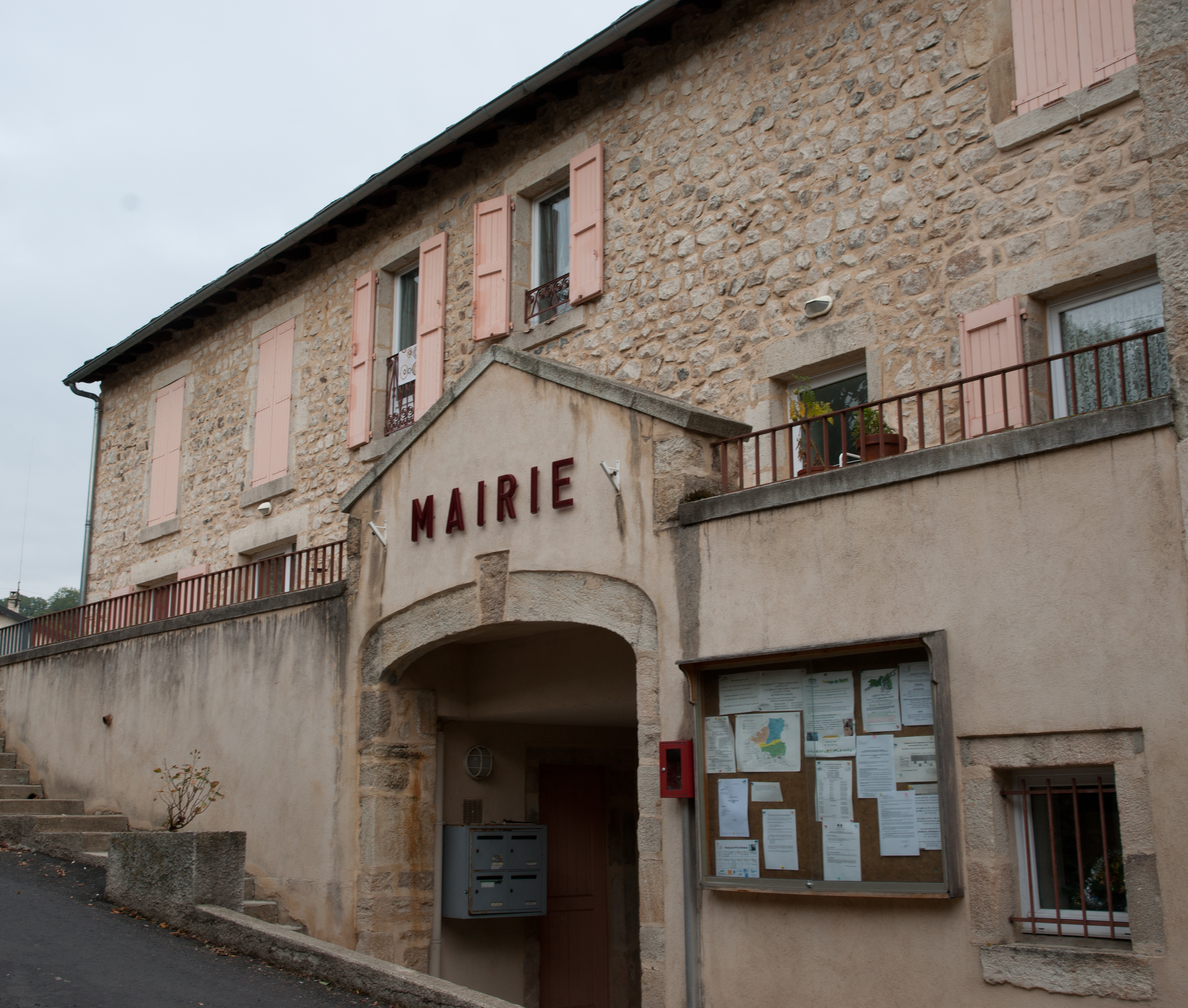 Mairie de Église Saint-Étienne-Lardeyrol